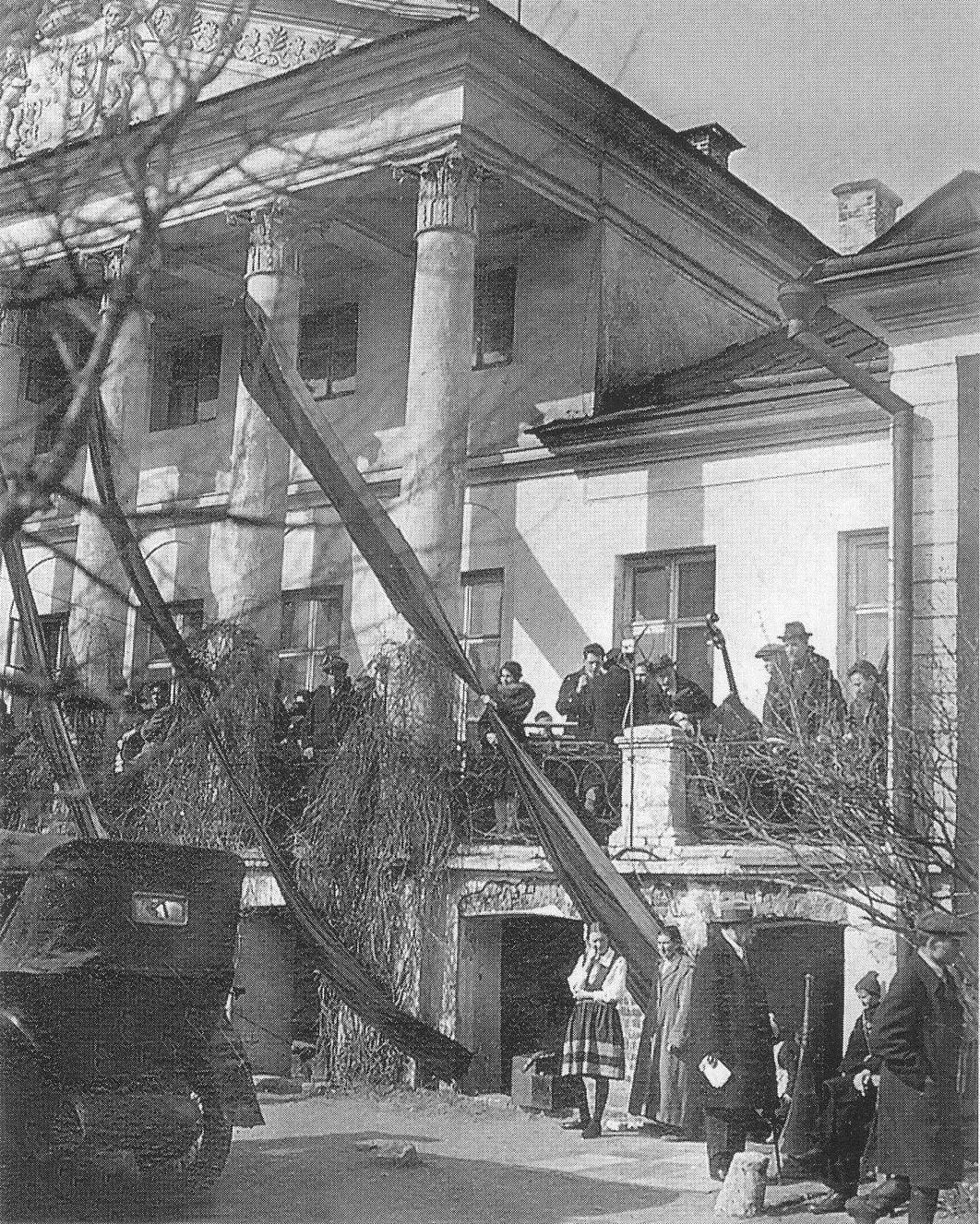 Похороны В. В. Маяковского. Траурное убранство подворья Клуба писателей на улице Воровского. 17 апреля 1930 года